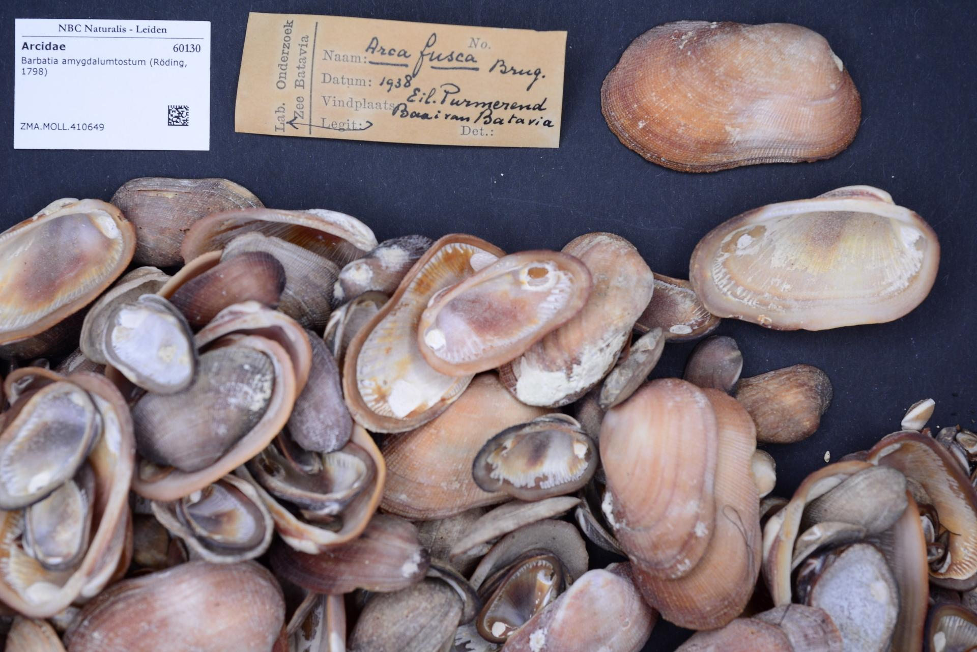 Barbatia amygdalumtostum (Röding, 1798)